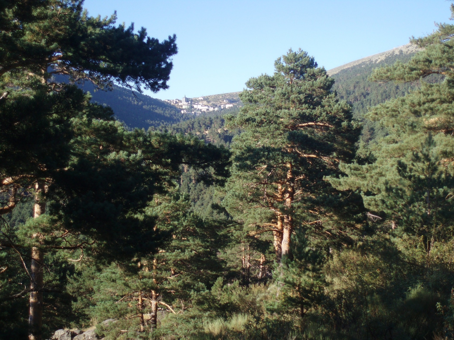 Valle de Navalmedio con el puerto de Navacerrada al fondo (Sierra de Guadarrama, España). Bosque de Pinus sylvestris.